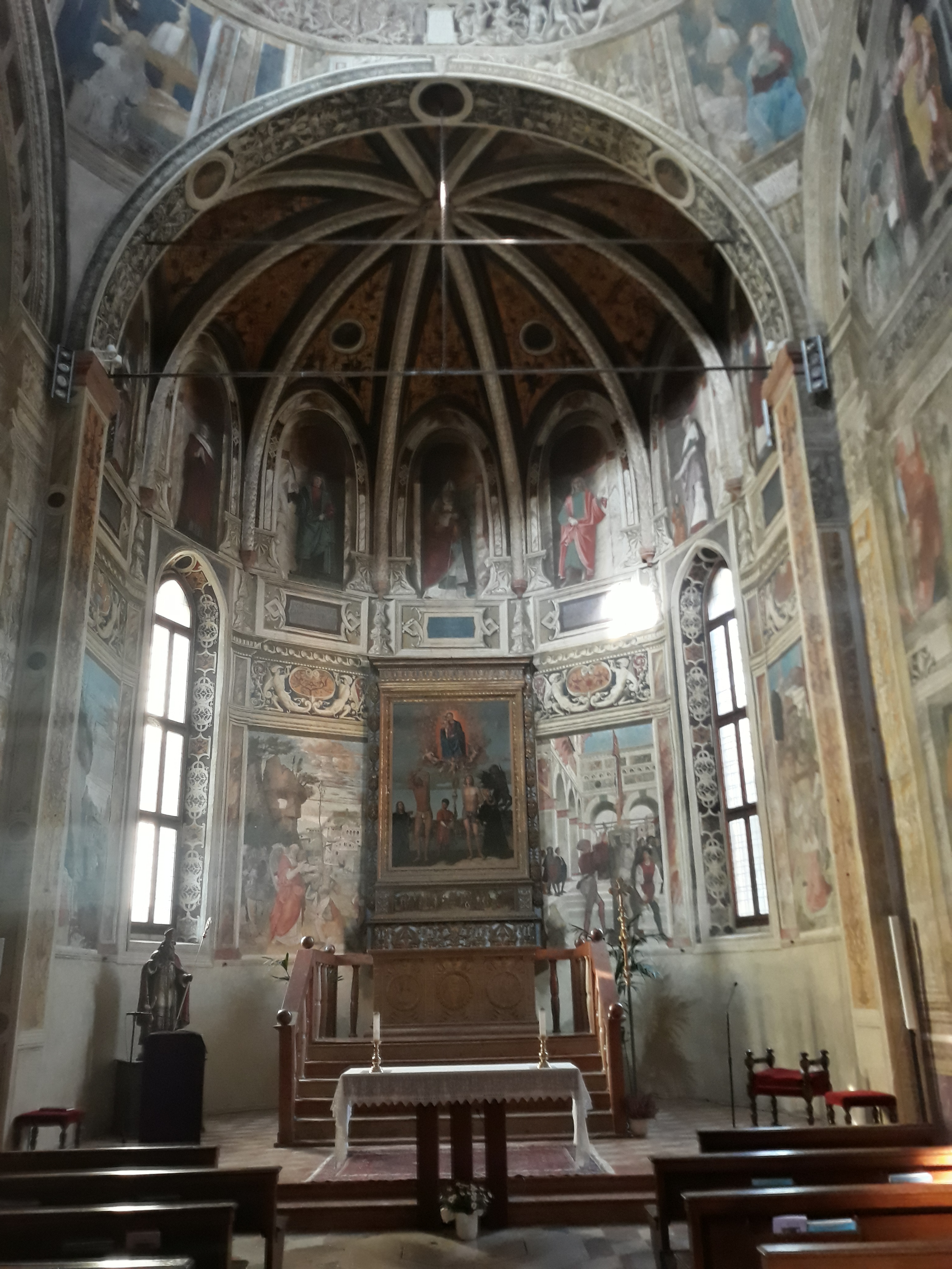 Cappella di San Biagio presso al chiesa di San Nazaro e Celso a Verona